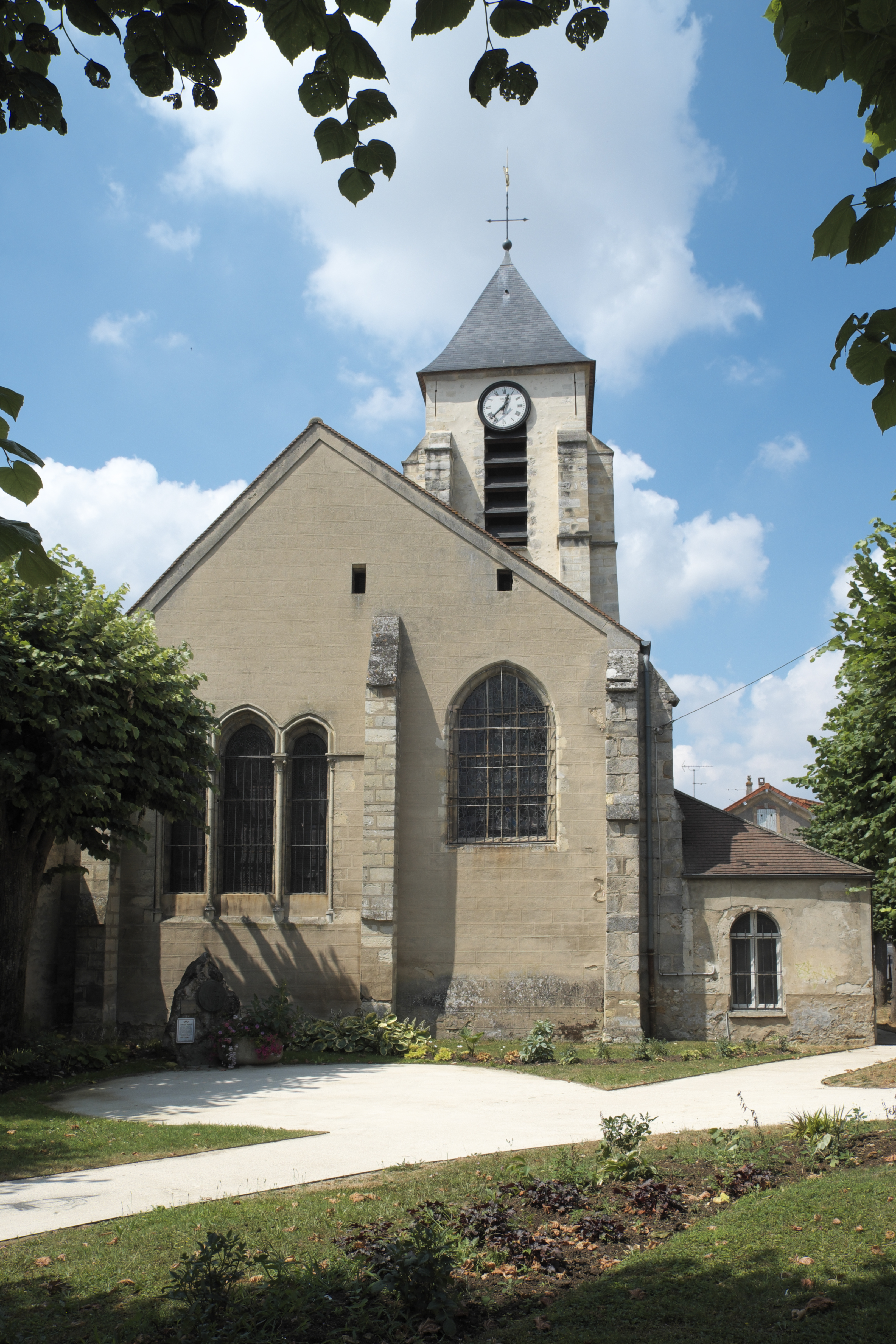 Katholische Pfarrkirche Saint-Leu-Saint-Gilles in Épinay-sur-Orge im Département Essonnes (Île-de-France/Frankreich), Ansicht von Osten